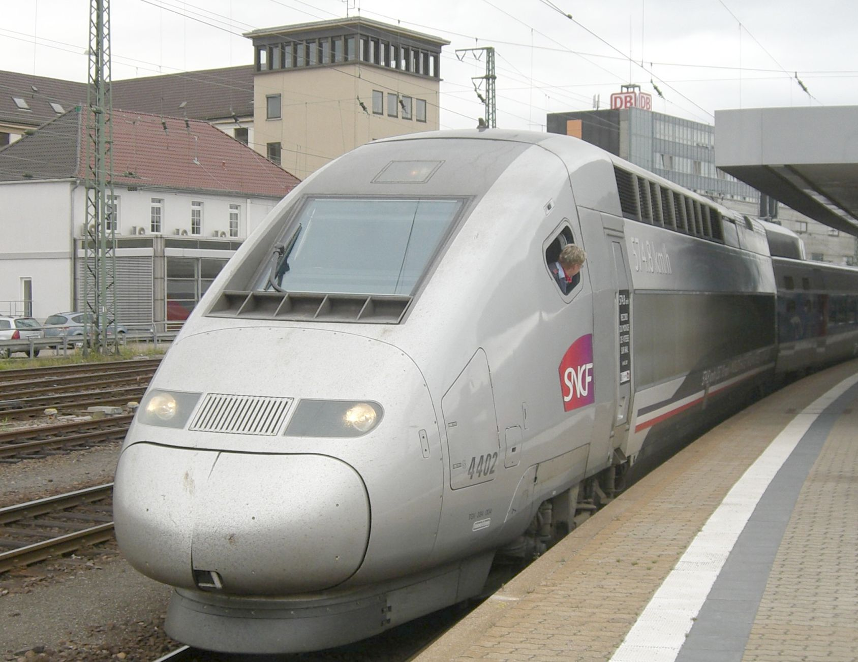 TGV Paris-Frankfurt in Saarbrücken Hbf. Der TGV POS Nr. 4402 fuhr als Ersatz für einen ausgefallenen ICE und wurde von einer deutschen Lokführerin gefahren